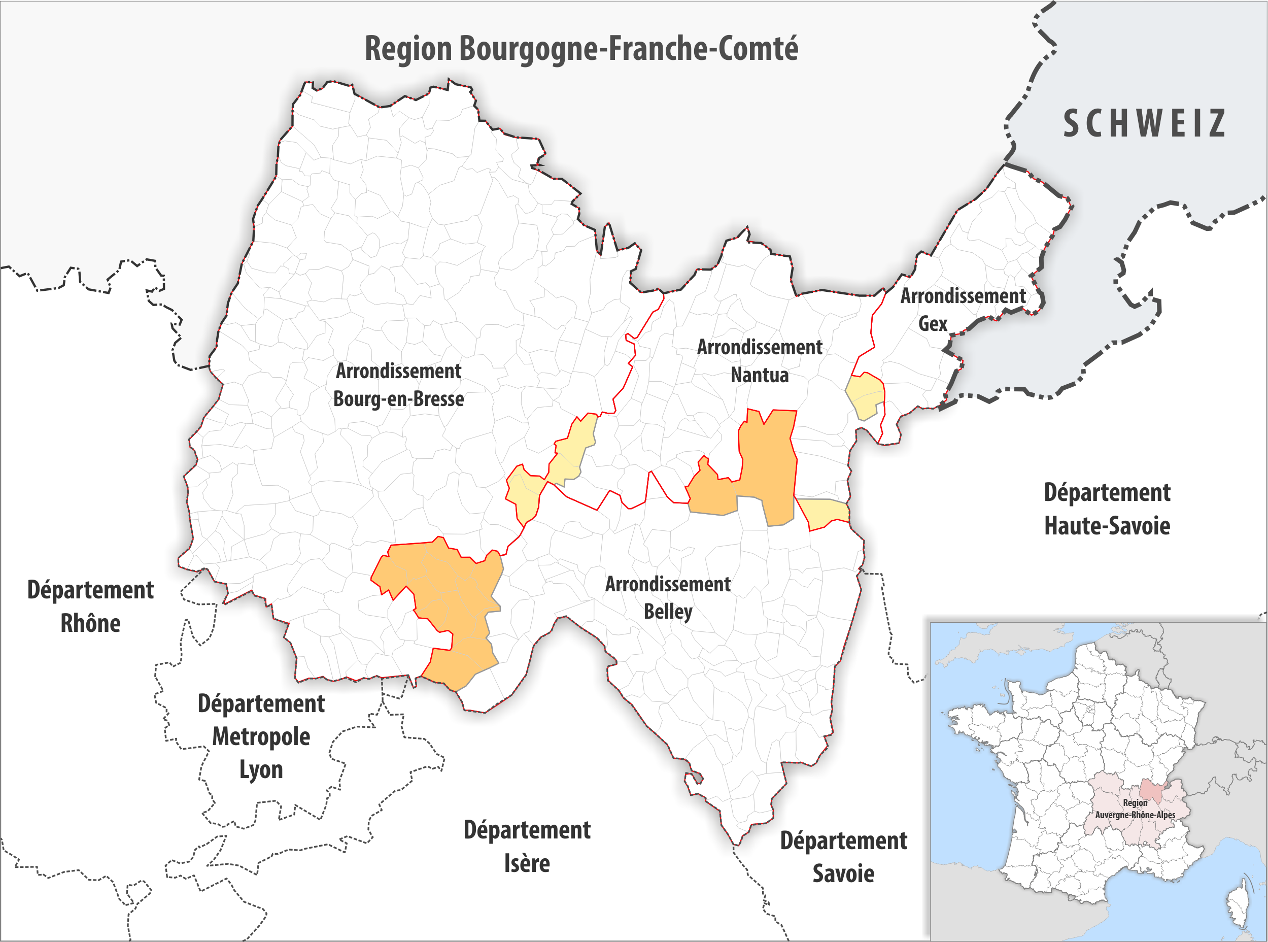 Arrondissements Anpassungen auf 2017 im Departement Ain